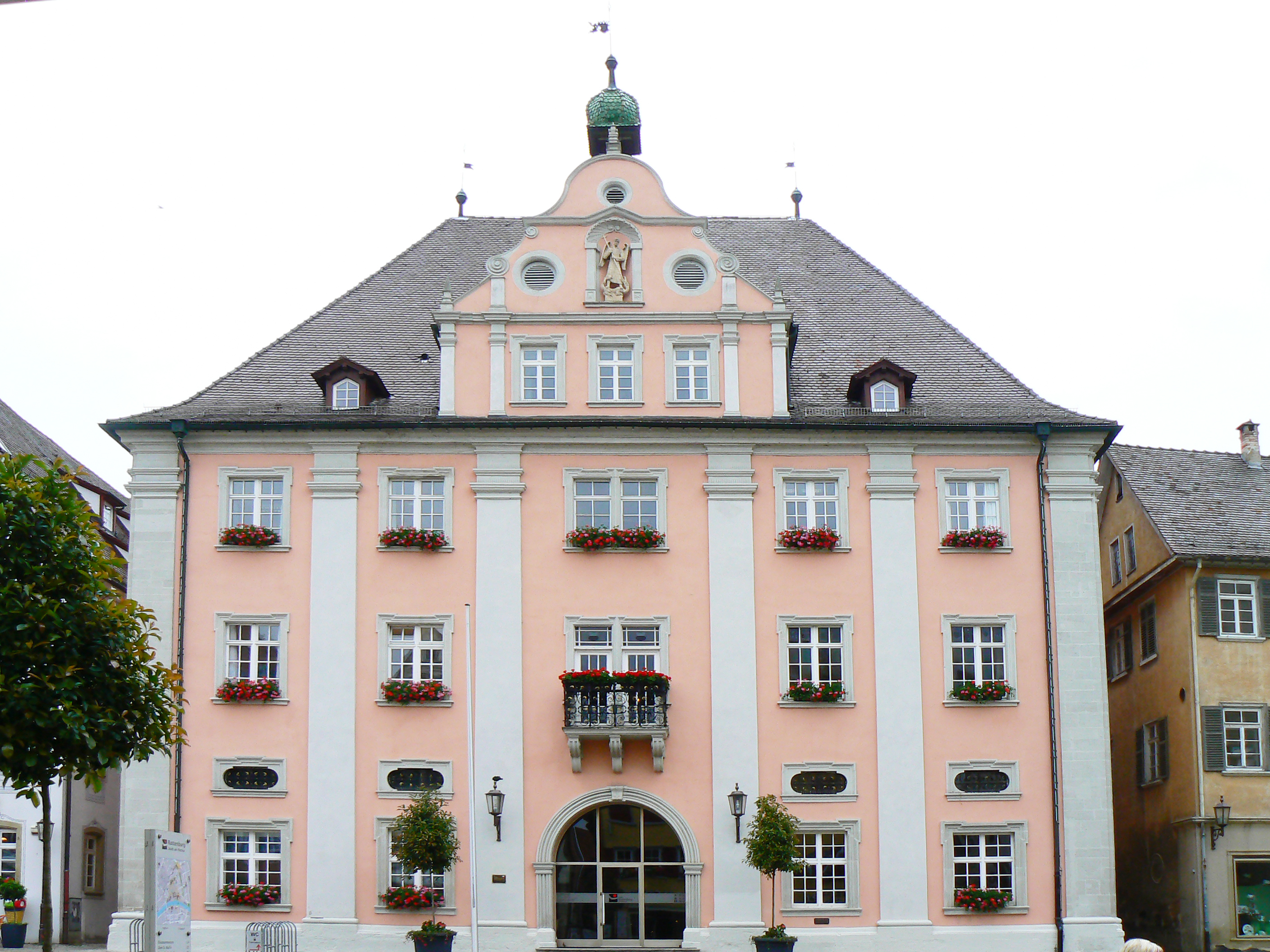 Rottenburg am Neckar. Rathaus